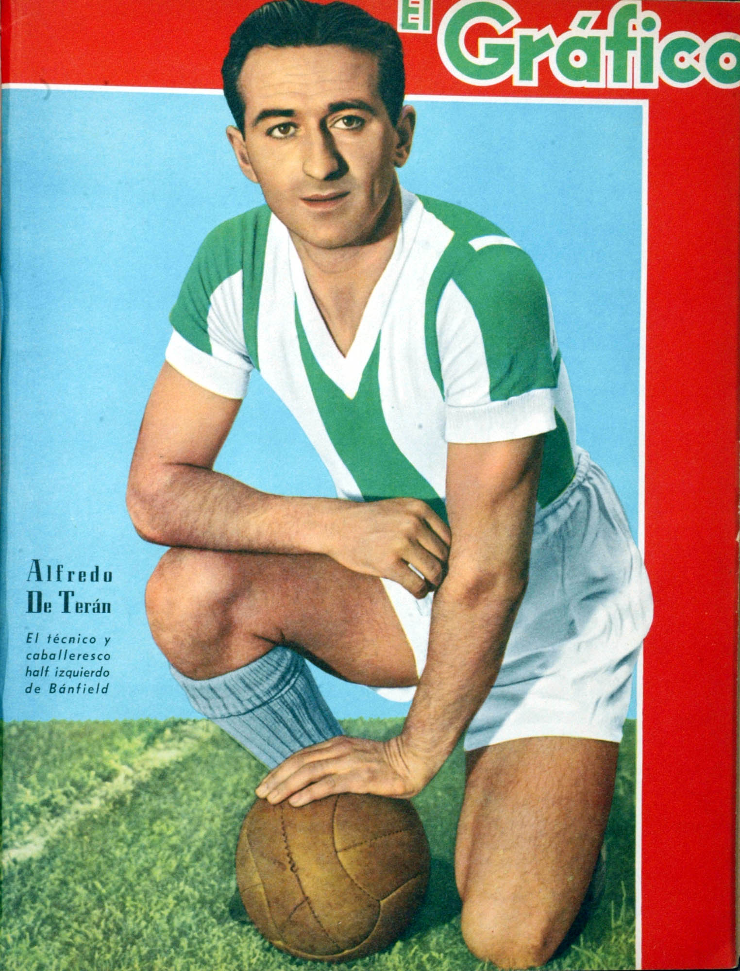 El Gráfico del 05 de Noviembre de 1943. Edición 1269.